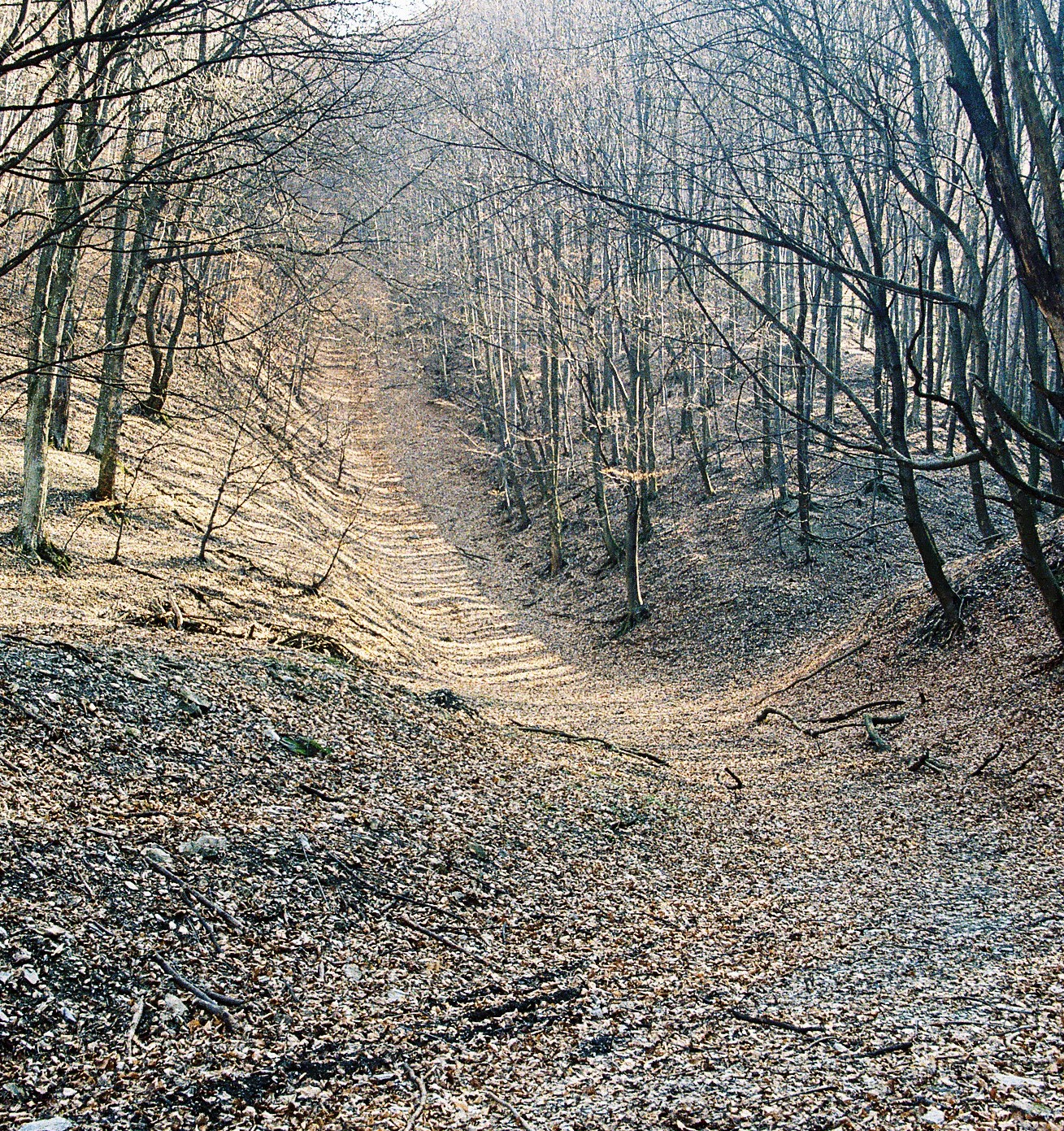 Die Schiefe Ebene der Szalajkabahn in Ungarn